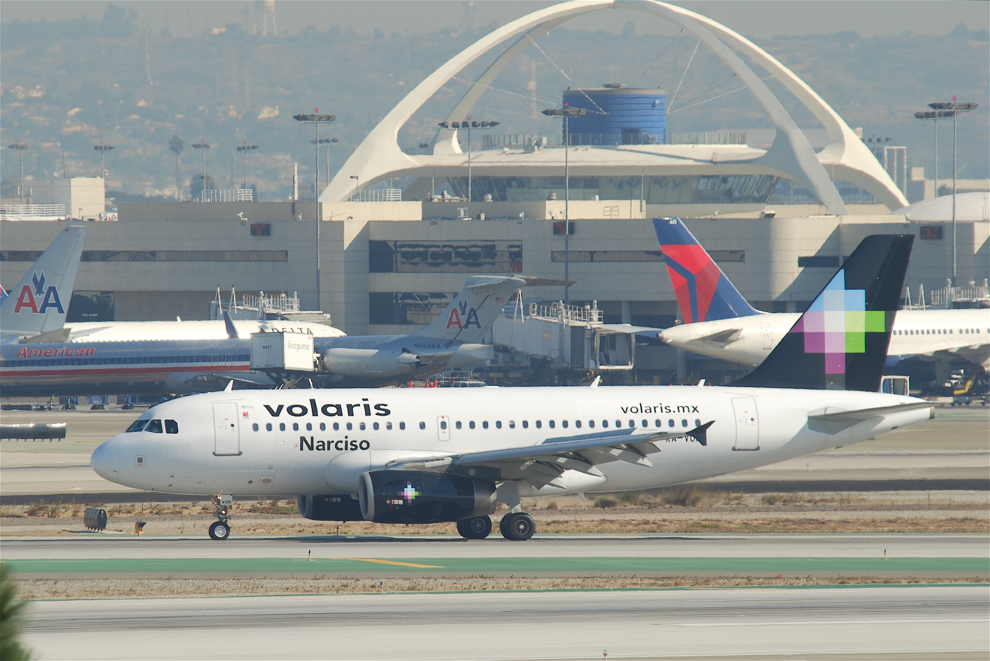 Volaris Airbus A319-132; XA-VOR@LAX;10.10.2011/622fw